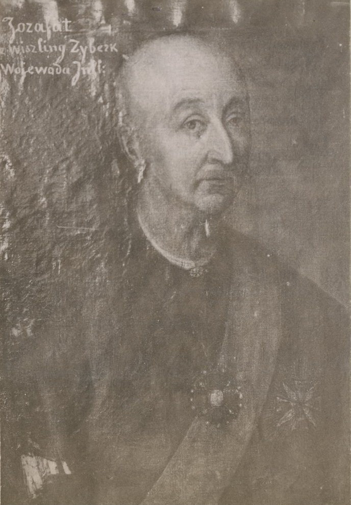 Беларуская (тарашкевіца): Партрэт Язафата Зыбэрка (Jazafat Zyberk)